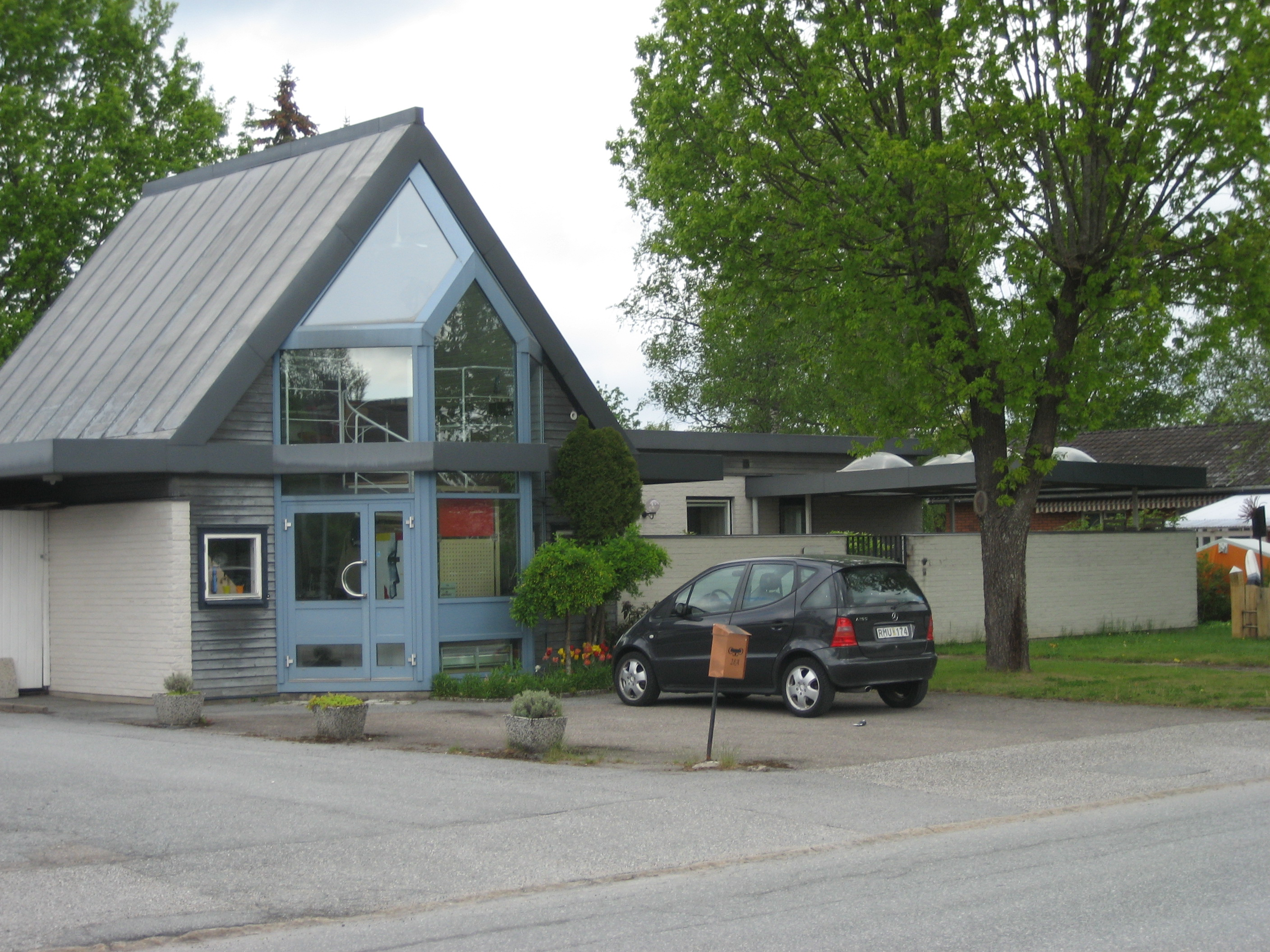 House in Adolfsberg Örebro, Sweden